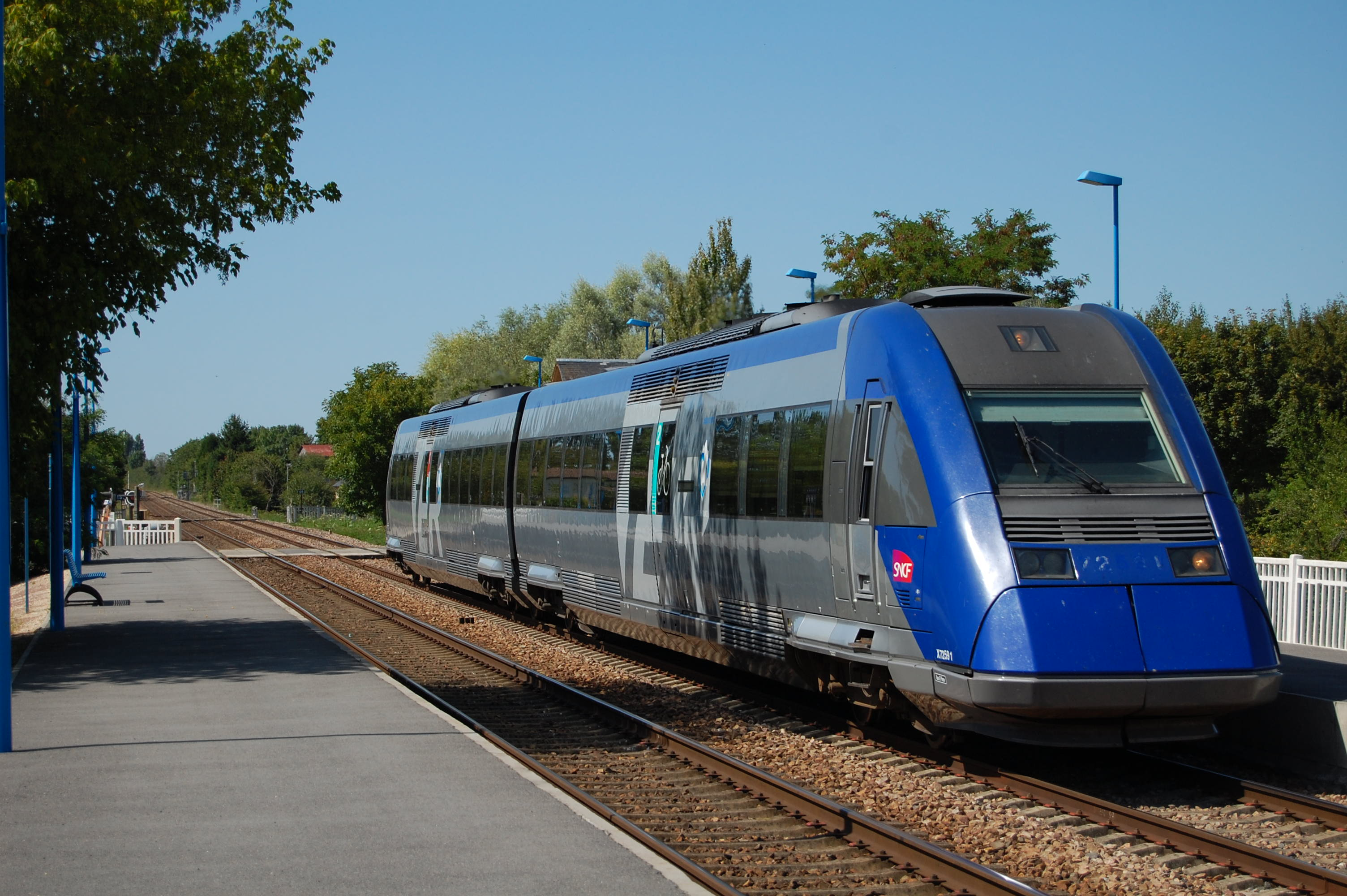 Un automoteur X72500 passe dans la gare de Bengy.